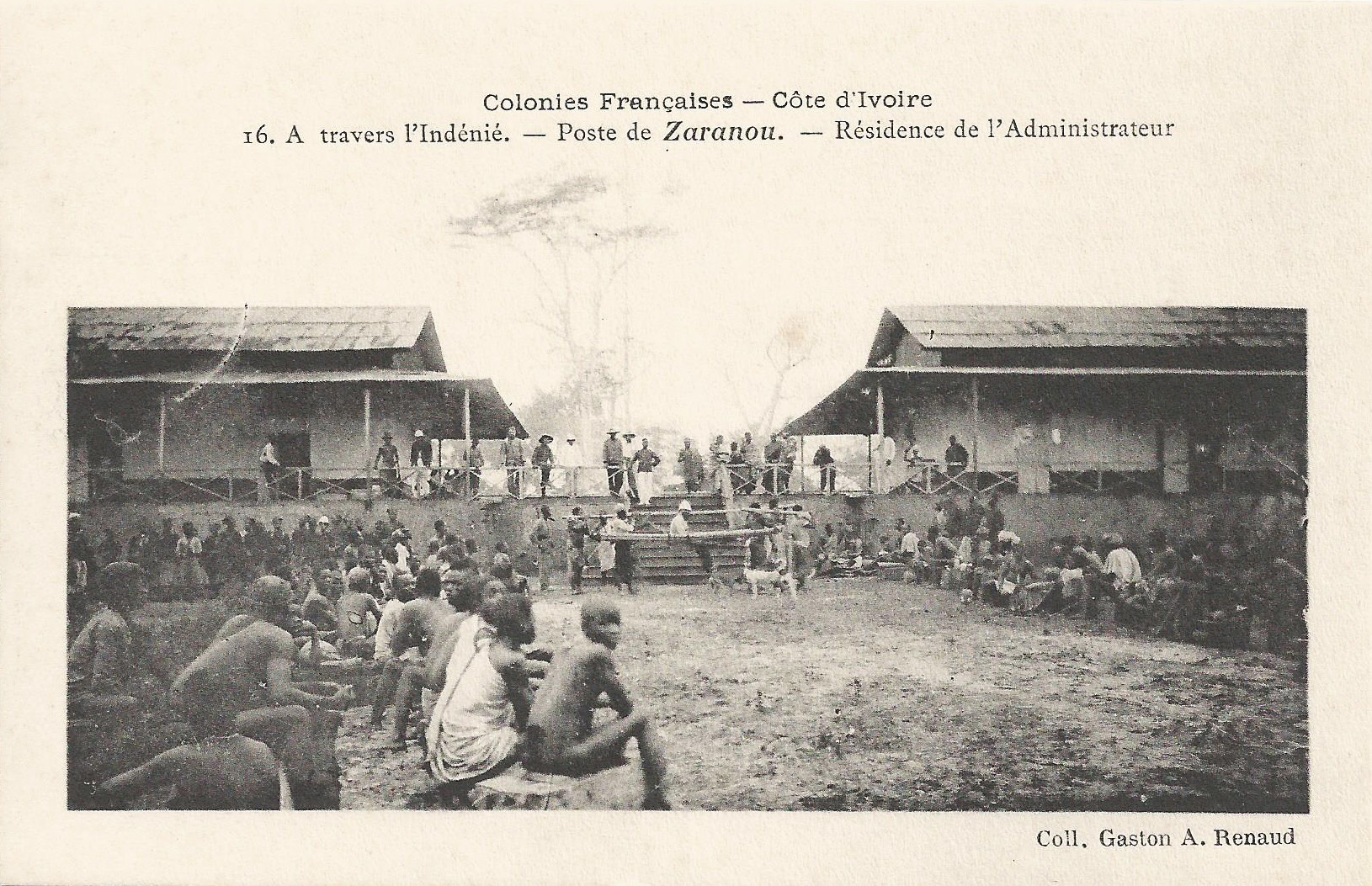 A travers l'Indénié. Poste de Zaranou. résidence de l'Administrateur. Colonies françaises. Côte d'Ivoire